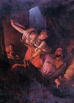 Владимир и Рогнеда